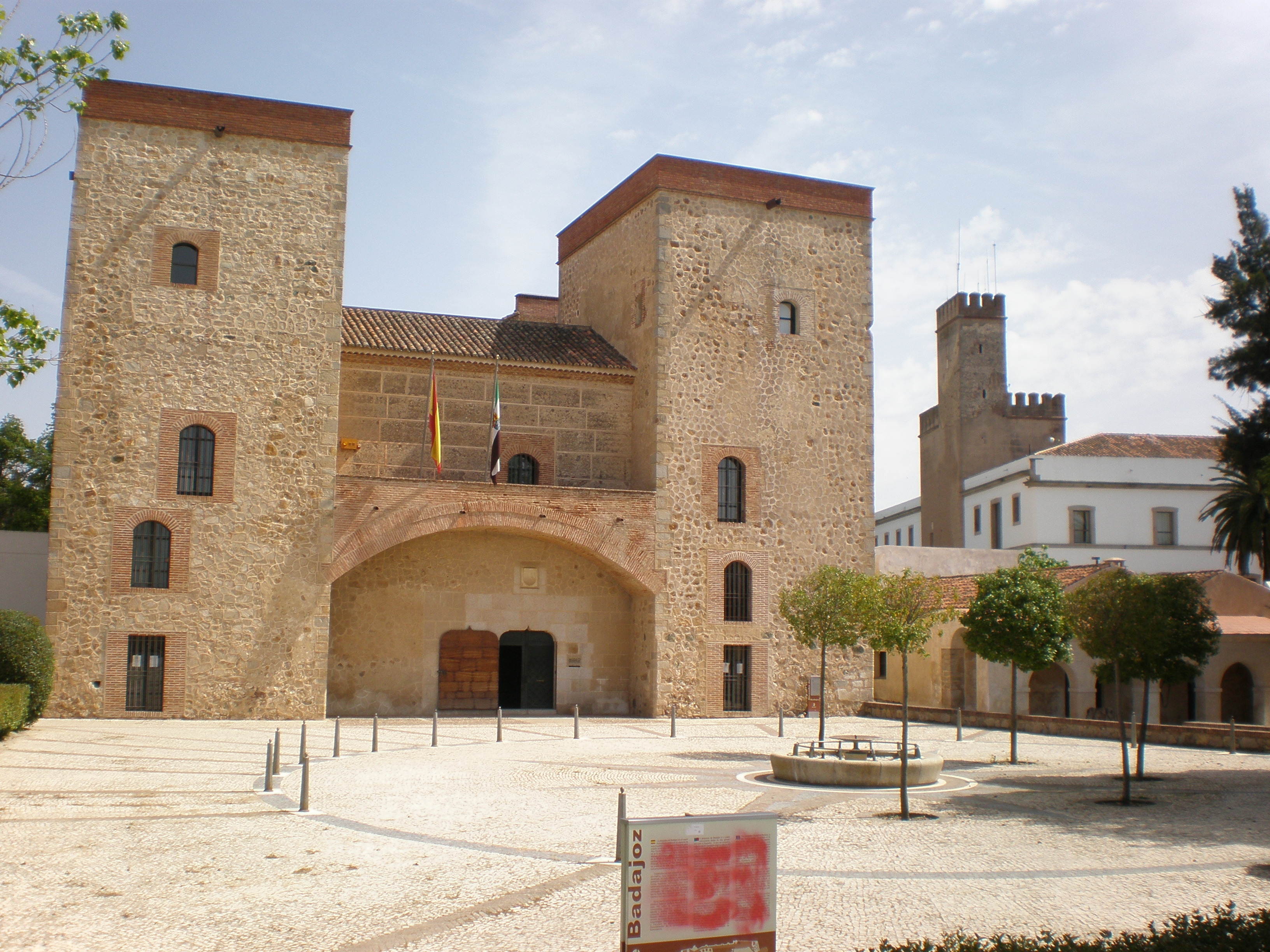 Palaco de la Dukoj de Feria.